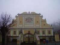 Pohled na klášter